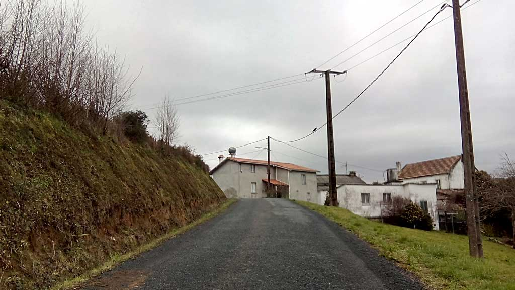 Vista dos Tordos, Doso, Narón.